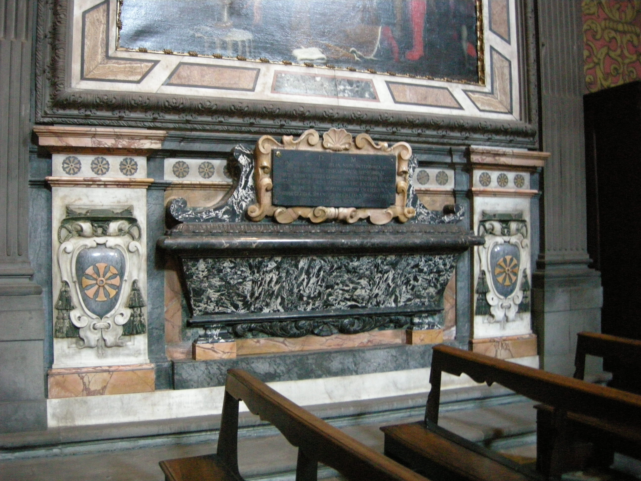 San gaetano, transetto dx,tomba pietro bonsi